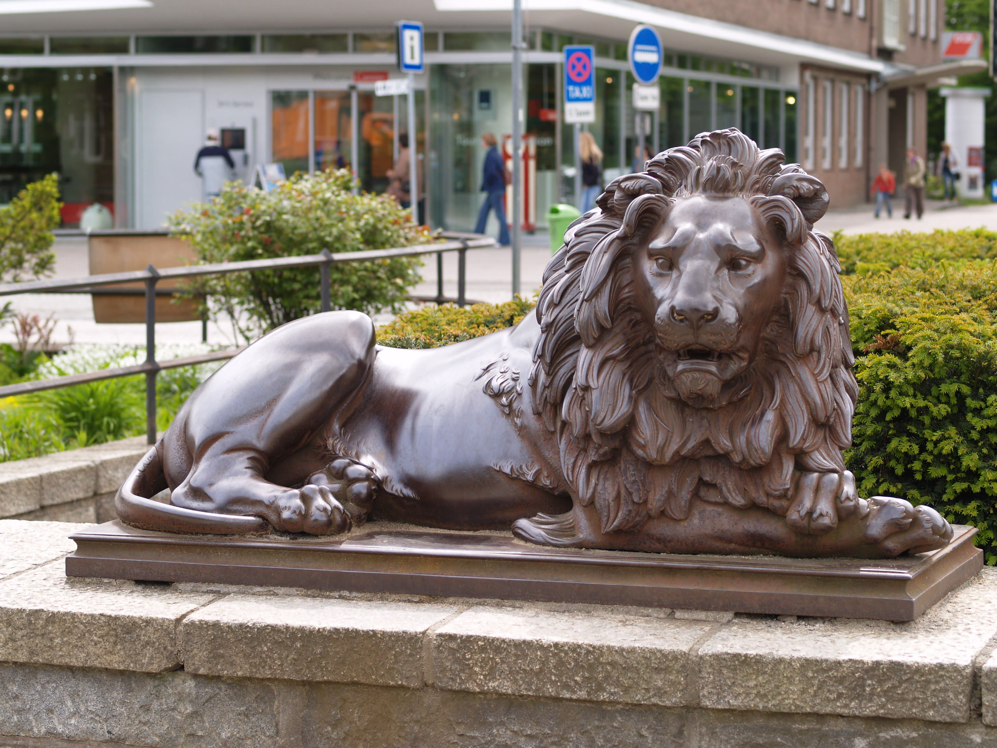 The Lübecker Lions, 1823, (Christian Daniel Rauch zugeschrieben) in front of the Holstentor, south one